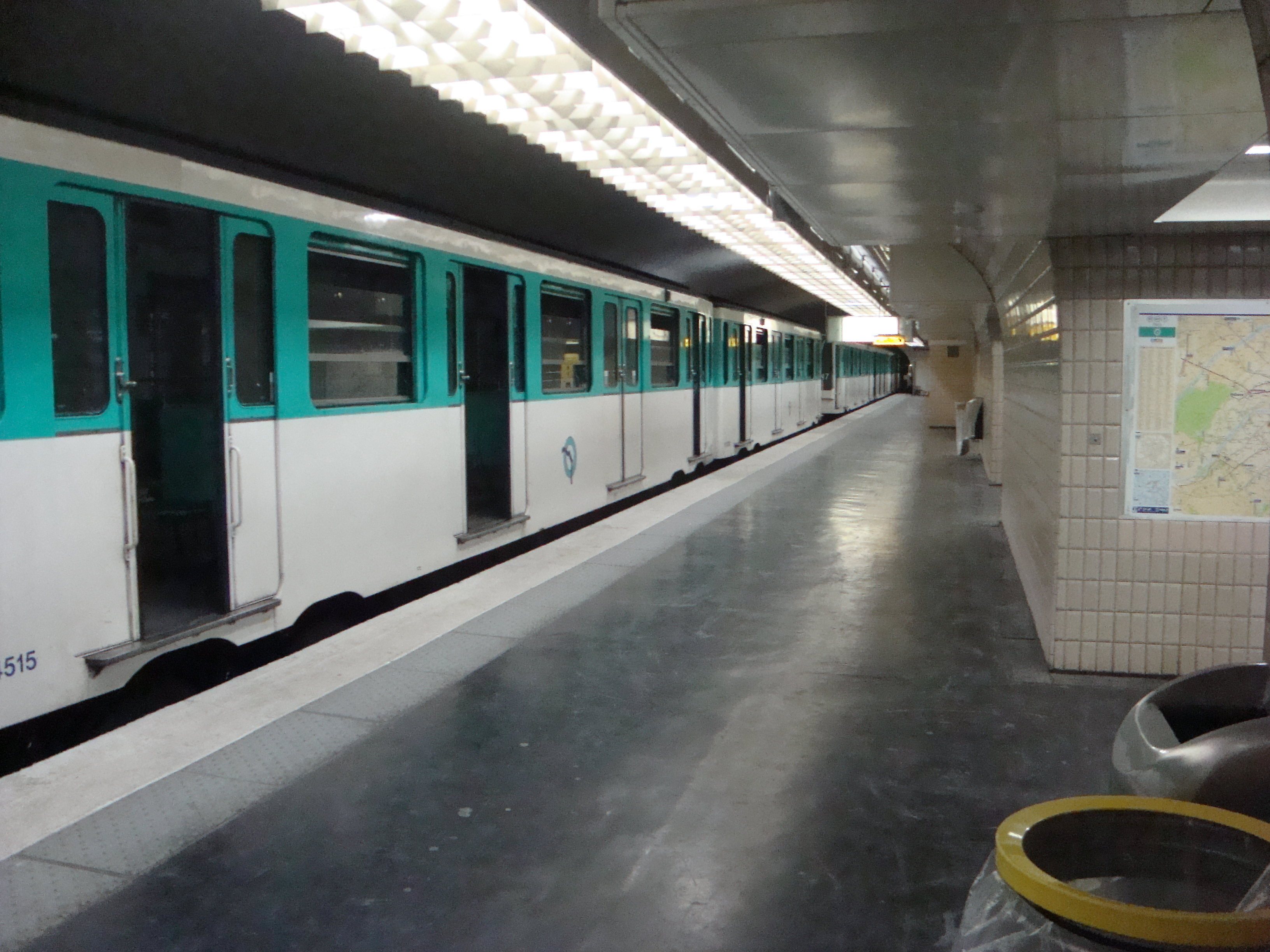 Rame à l'arrêt pour nettoyage sur quai latéral à la station Kléber sur la ligne 6 du métro de Paris